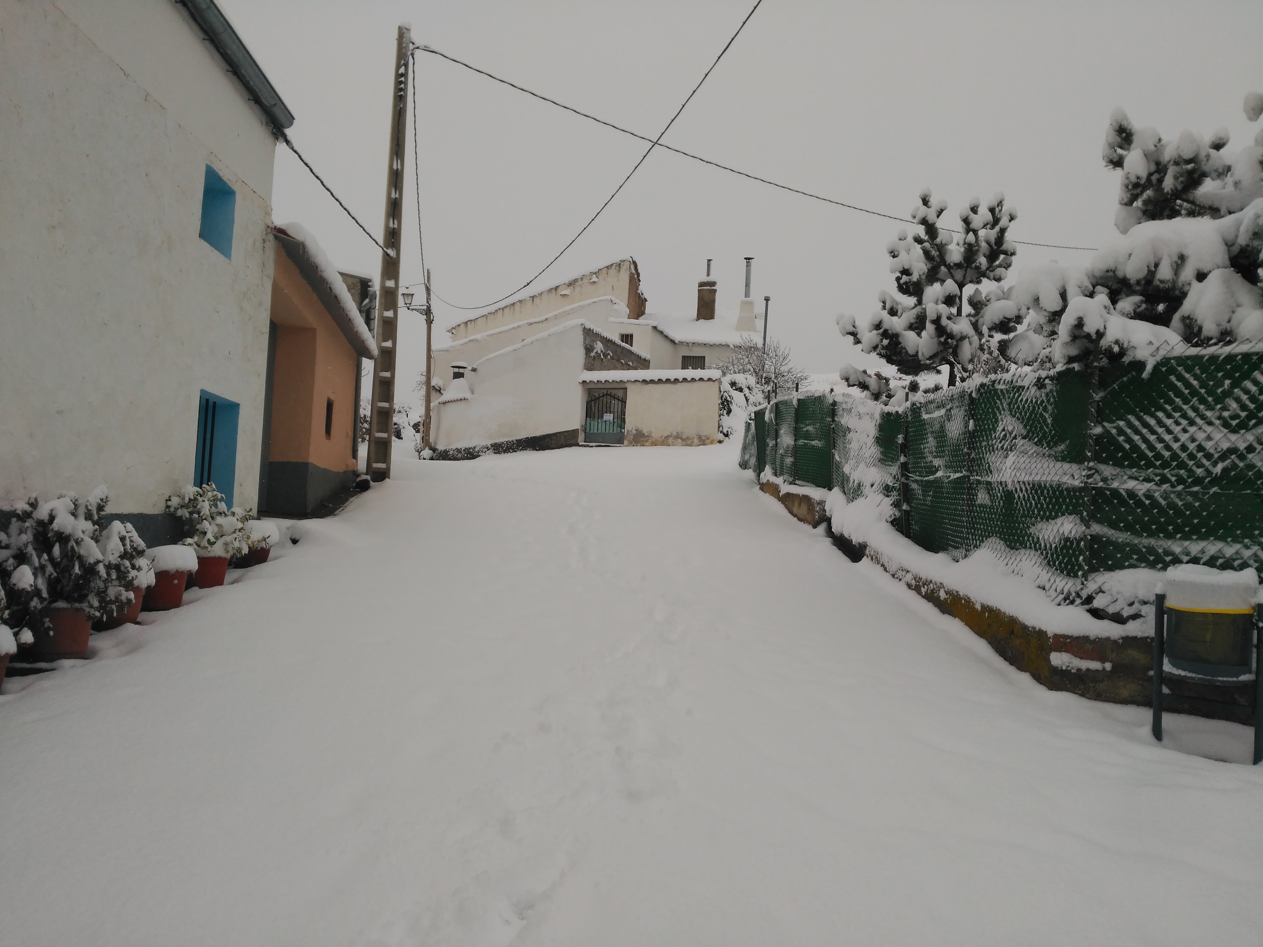 Otra calle de Bádenas en invierno